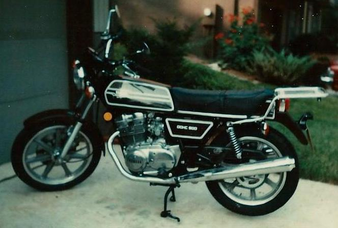 1977 Yamaha XS500S. Columbia, Maryland in 1977.